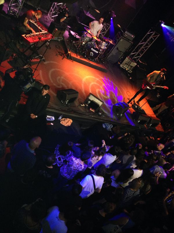 TUYA en la sala Joy Eslava